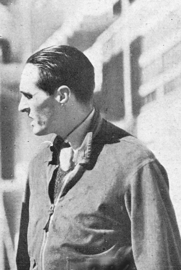 Il regista francese René Clair in un'immagine pubblicata in Italia nel 1933